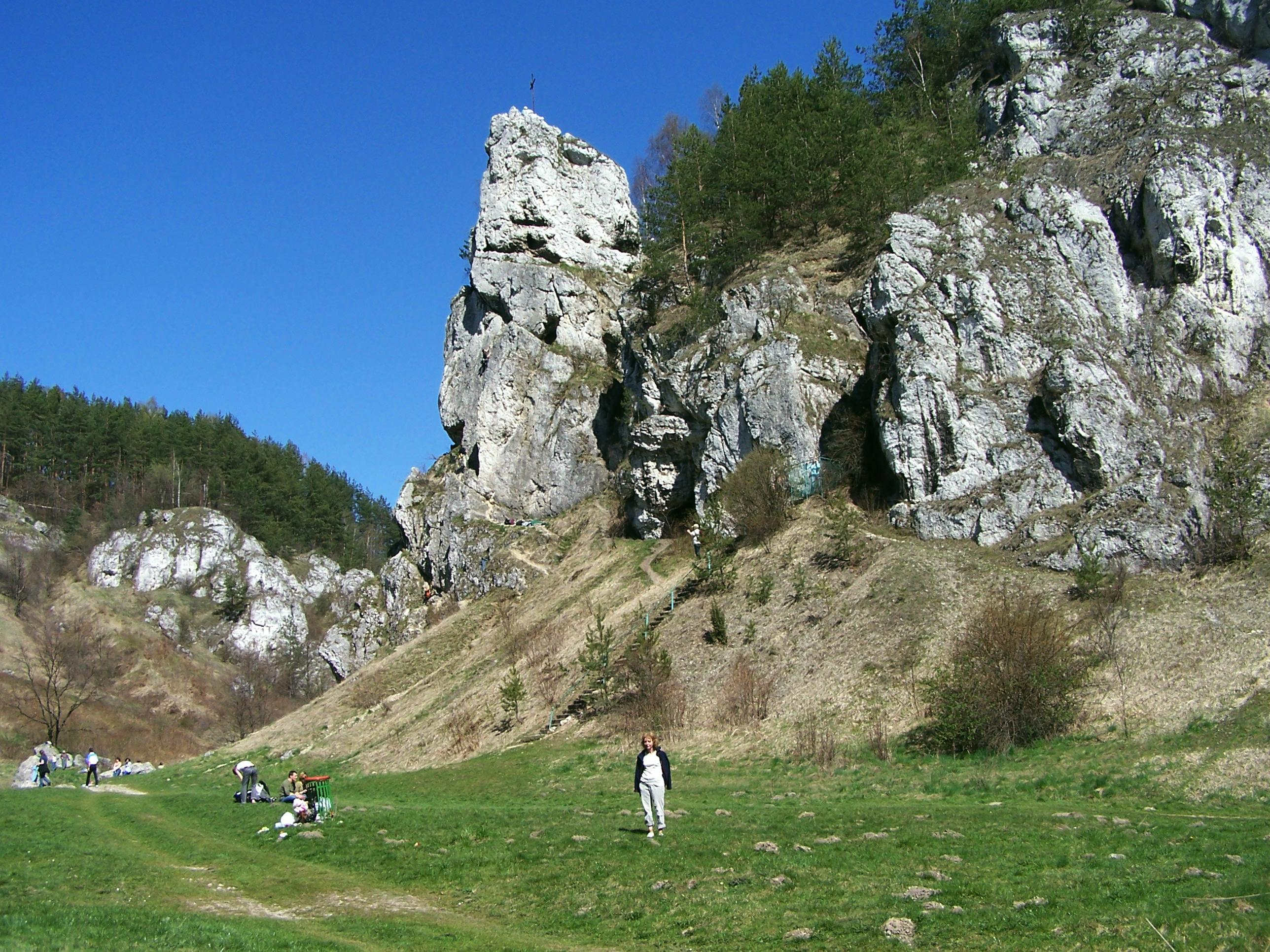 Dolina Kobylańska (Dolinki Krakowskie)